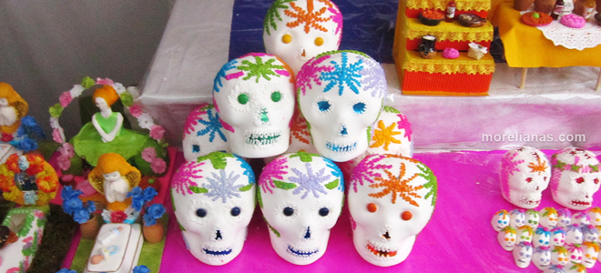 Dulces de azucar glass